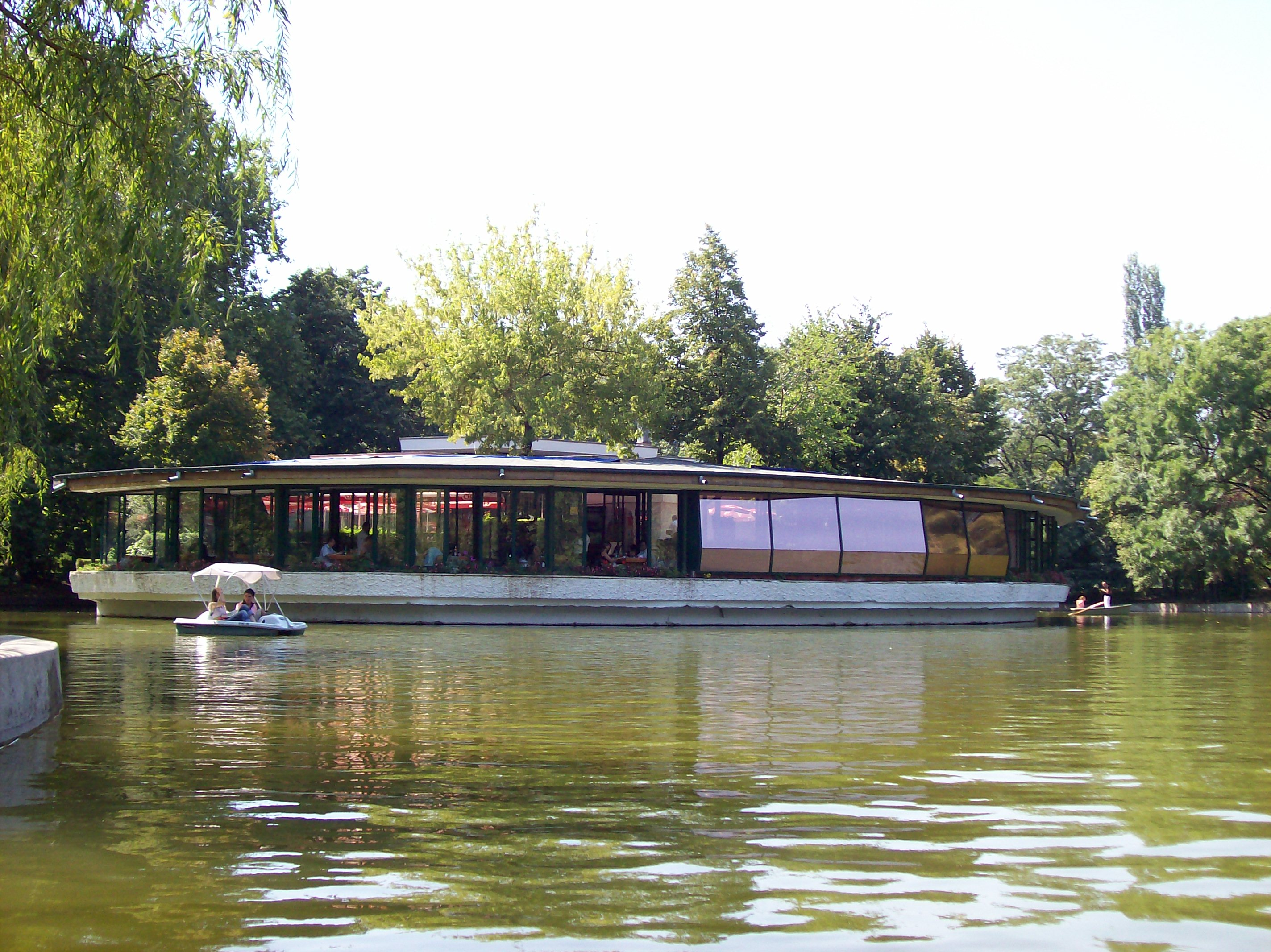 Restaurant Monte Carlo (Cismigiu) (Boekarest, Roemenië). Zomer 2006